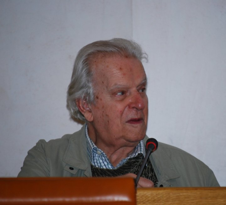 Roberto Giammanco